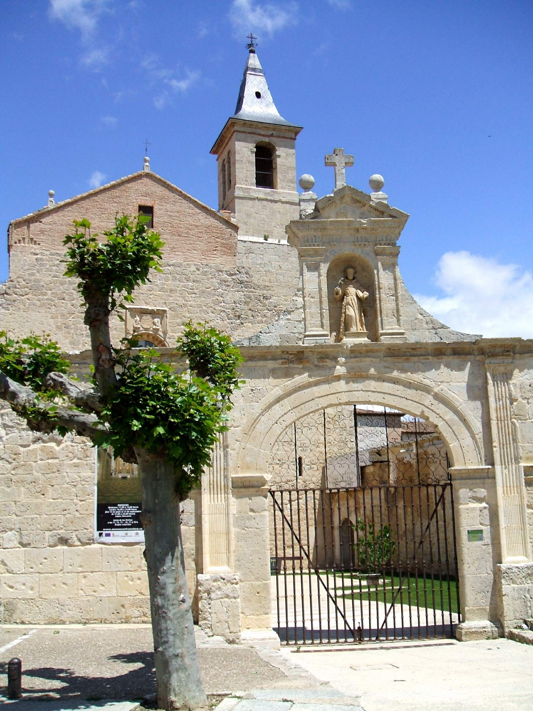 Convento de San Francisco (Medina de Rioseco, Valladolid)